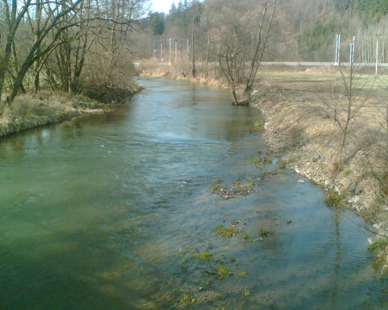 Moravská Sázava pod Hoštejnem 1